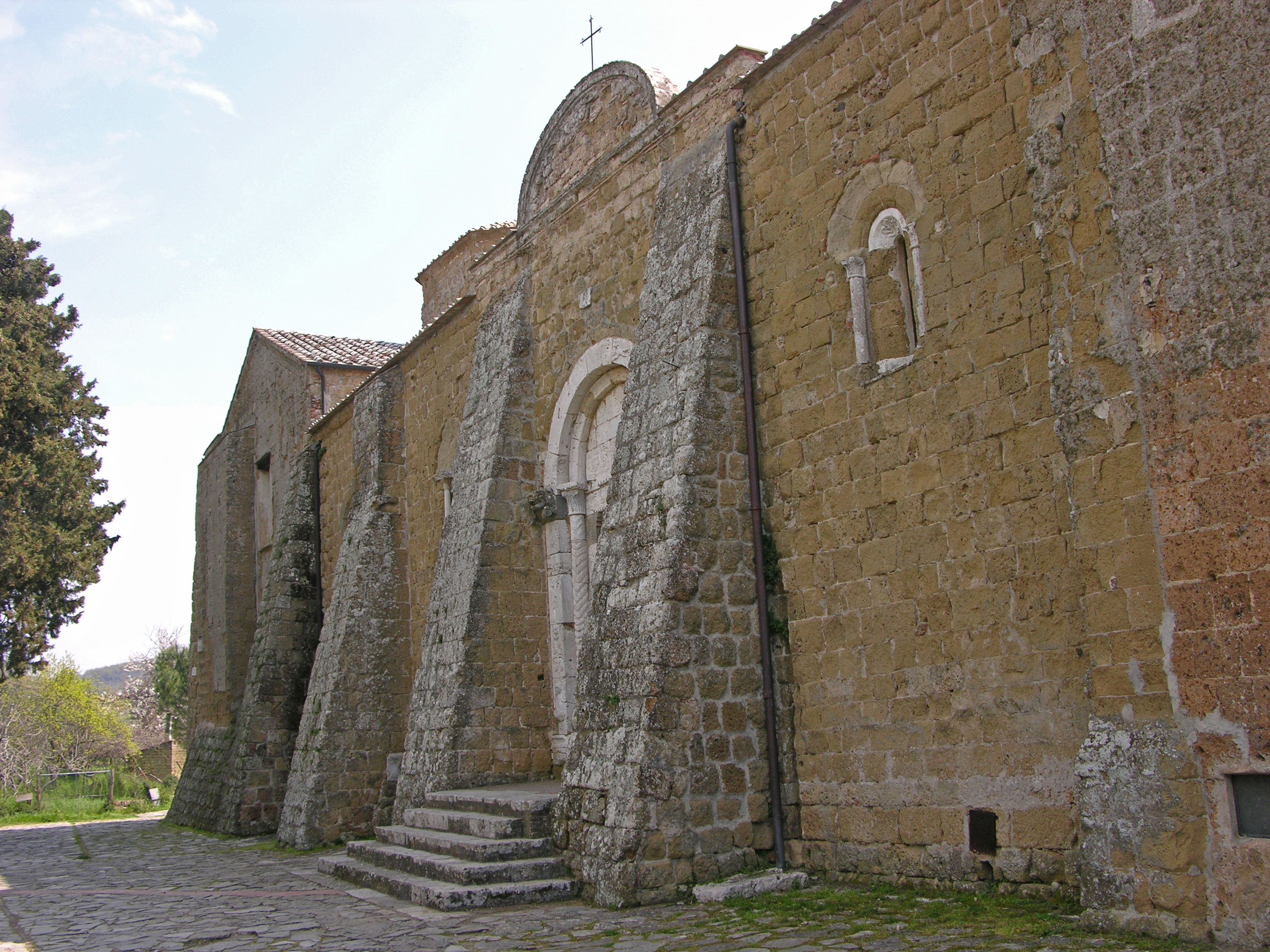 Duomo di Sovana (GR) - Facciata.